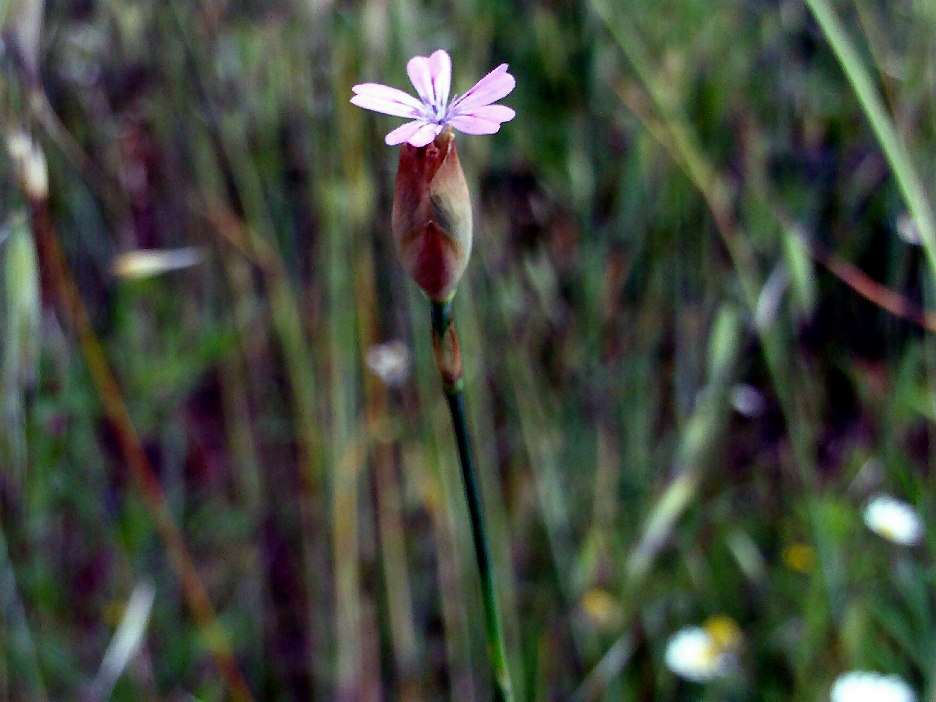 Petrorhagia nanteuilii flower close up, Dehesa Boyal de Puertollano, Spain